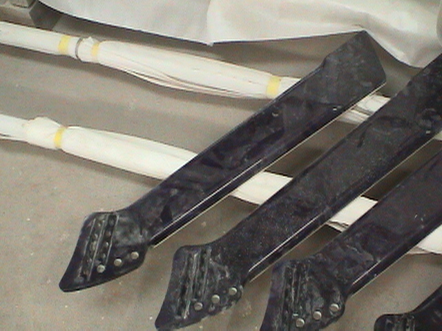 koyabu board necks